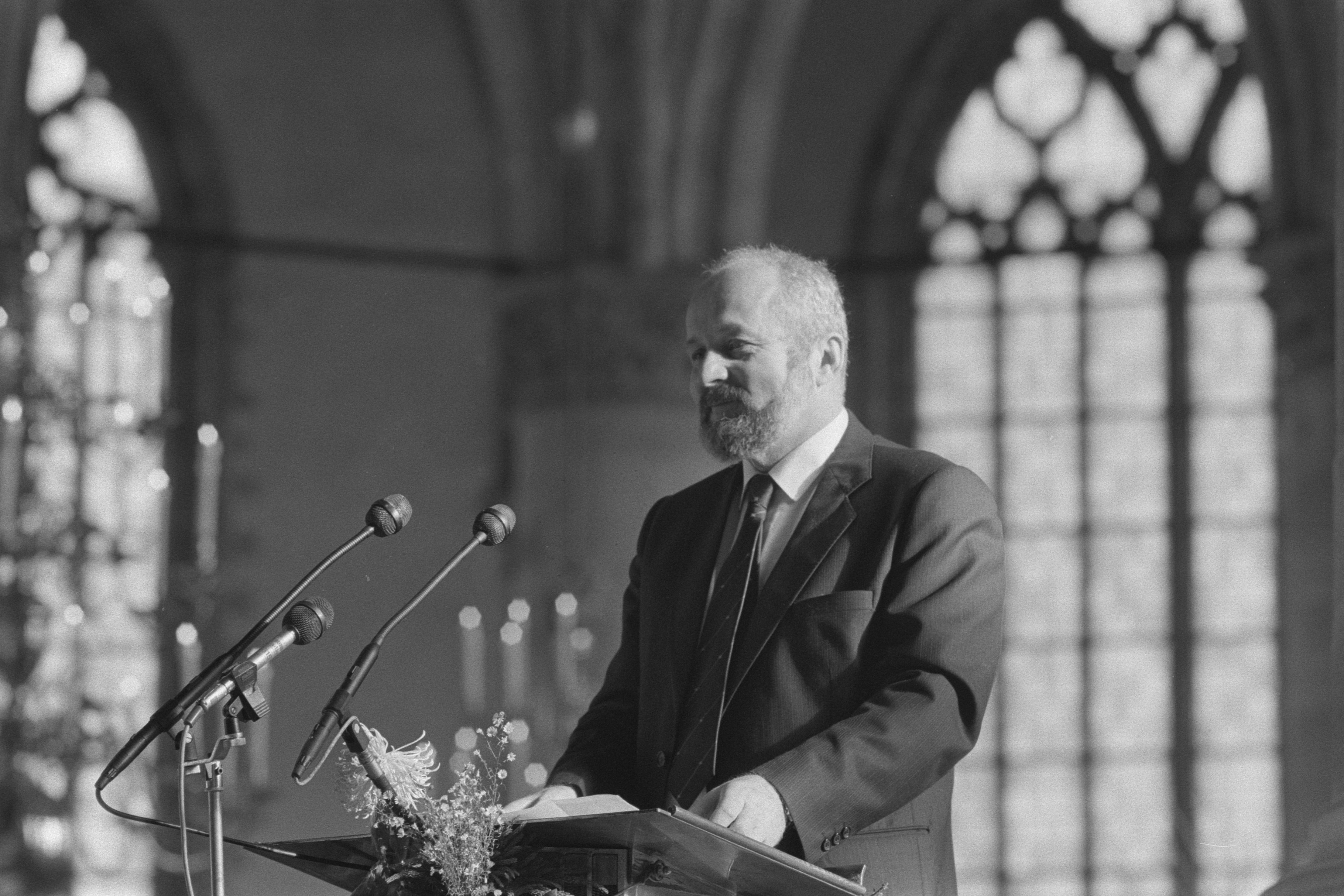 Uitreiking Erasmusprijs aan Tsjechische toneelschrijver en essayist Václav Havel door prins Bernhard; toespraak door professor František Janouch. Havel zelf is niet aanwezig omdat hij zijn land niet wilde verlaten. Datum 13 november 1986